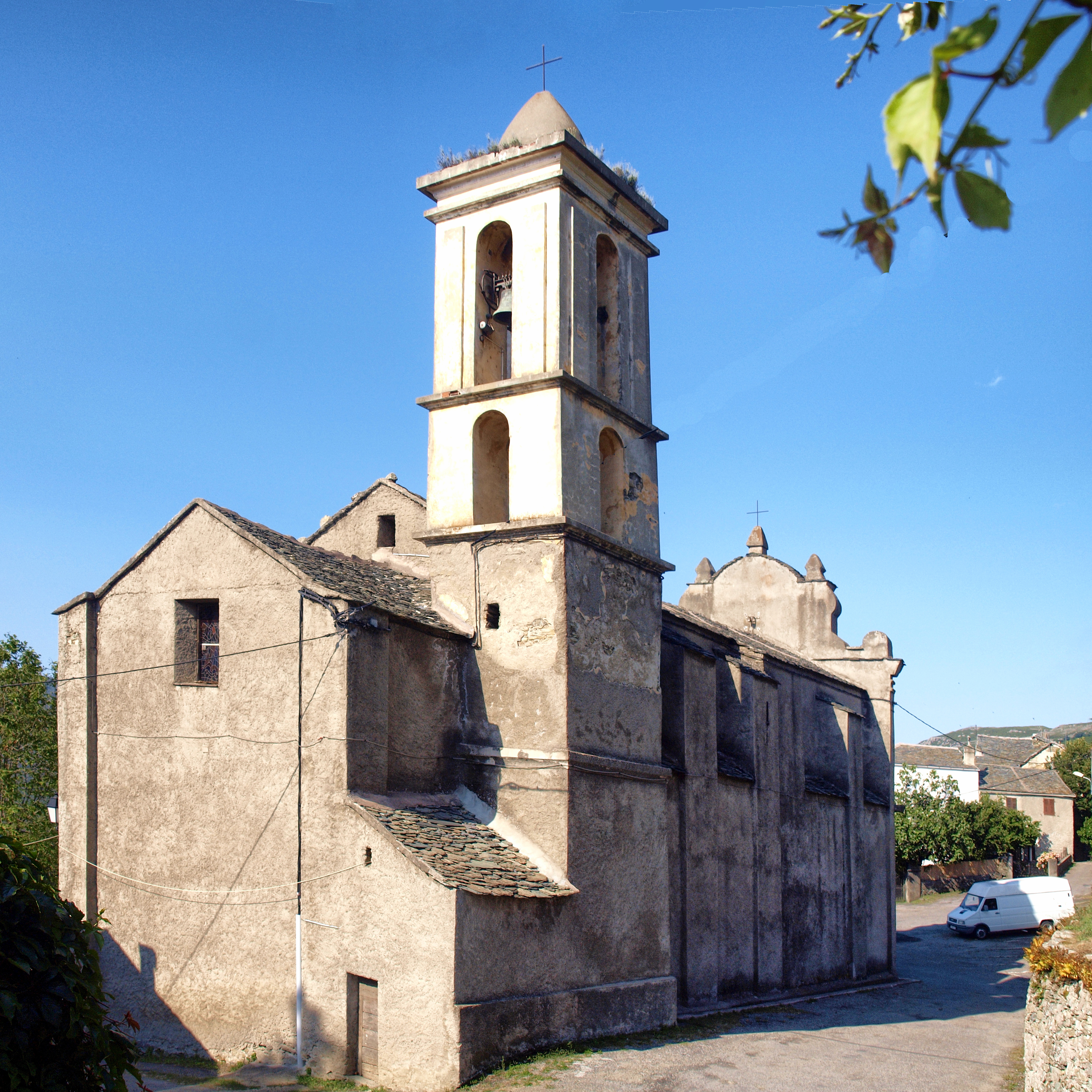 Rutali, Nebbio (Corse) - L'église paroissiale San Vitu du XVIIe siècle.